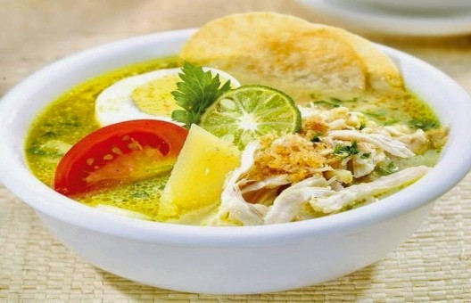 soto medan